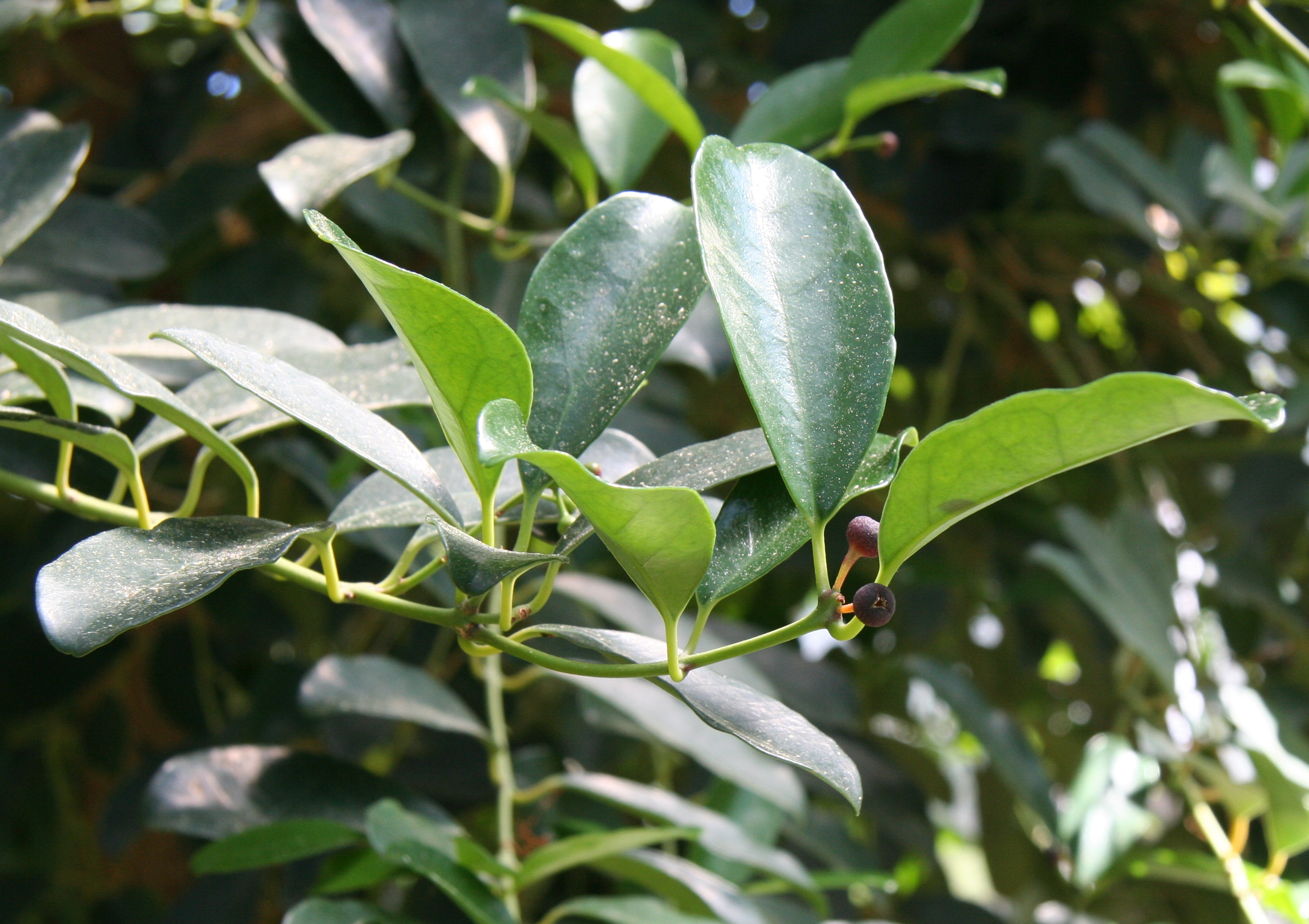 Tambourissa religiosa im Botanischen Garten Berlin